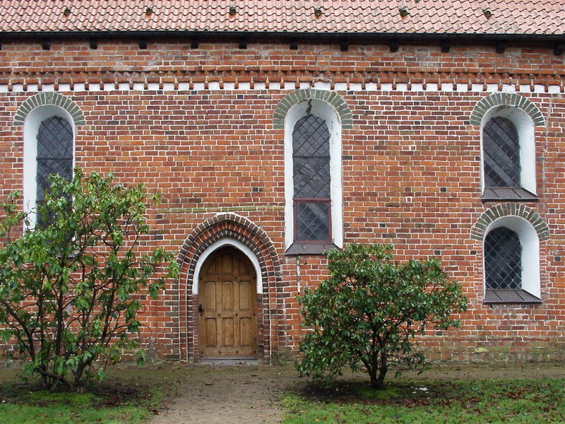 Haseldorf, Nordwand der Kirche 2002